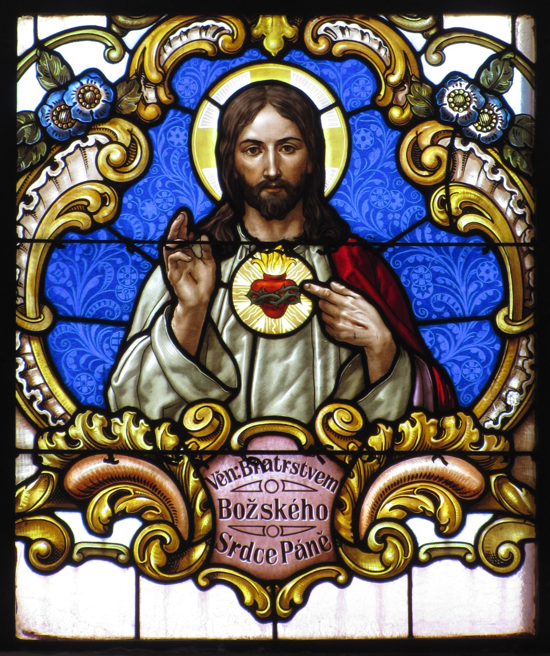 Vitráž v kostele Nanebevzetí Panny Marie a sv. Cyrila a Metoděje v Kyjově. Božské srdce Páně.